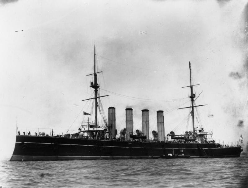 HMS EUROPA.